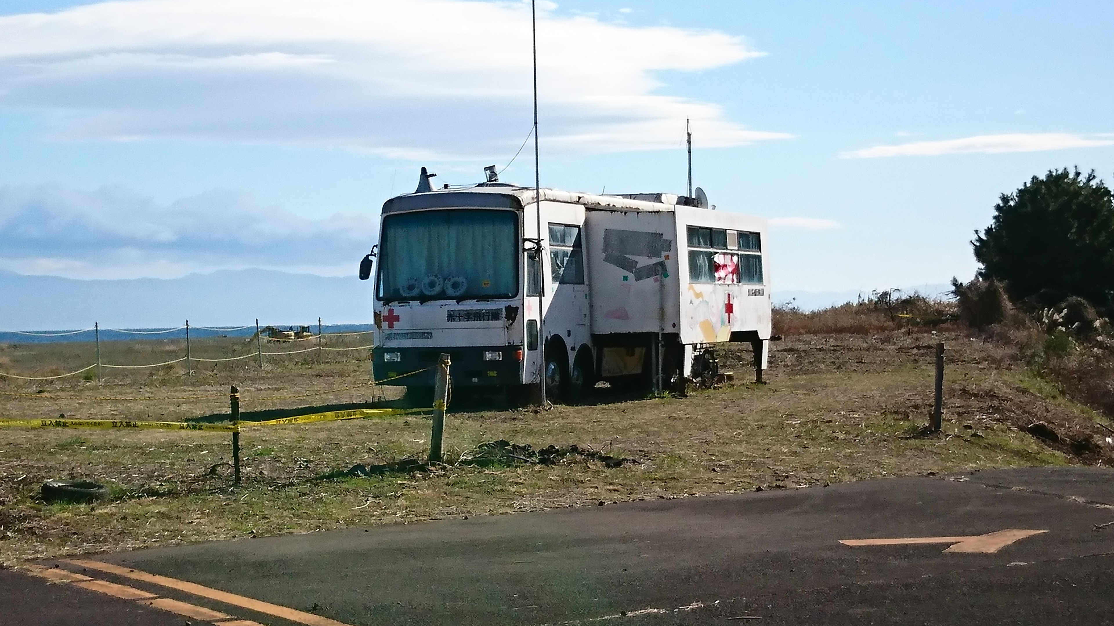 三保飛行場に配置されるキャンピングカーを転用した管制棟